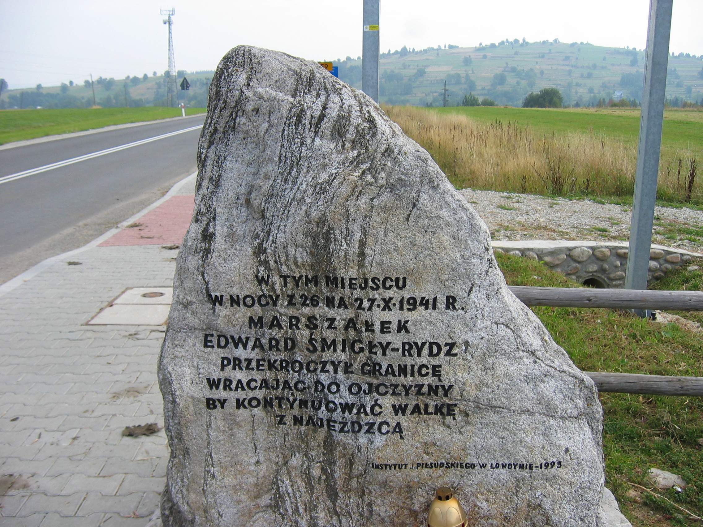 Suchá Hora, miejsce przekroczenia granicy przez marszałka Edwarda Rydza-Śmigłego w 1941. Photo by User:Mathiasrex Maciej Szczepańczyk